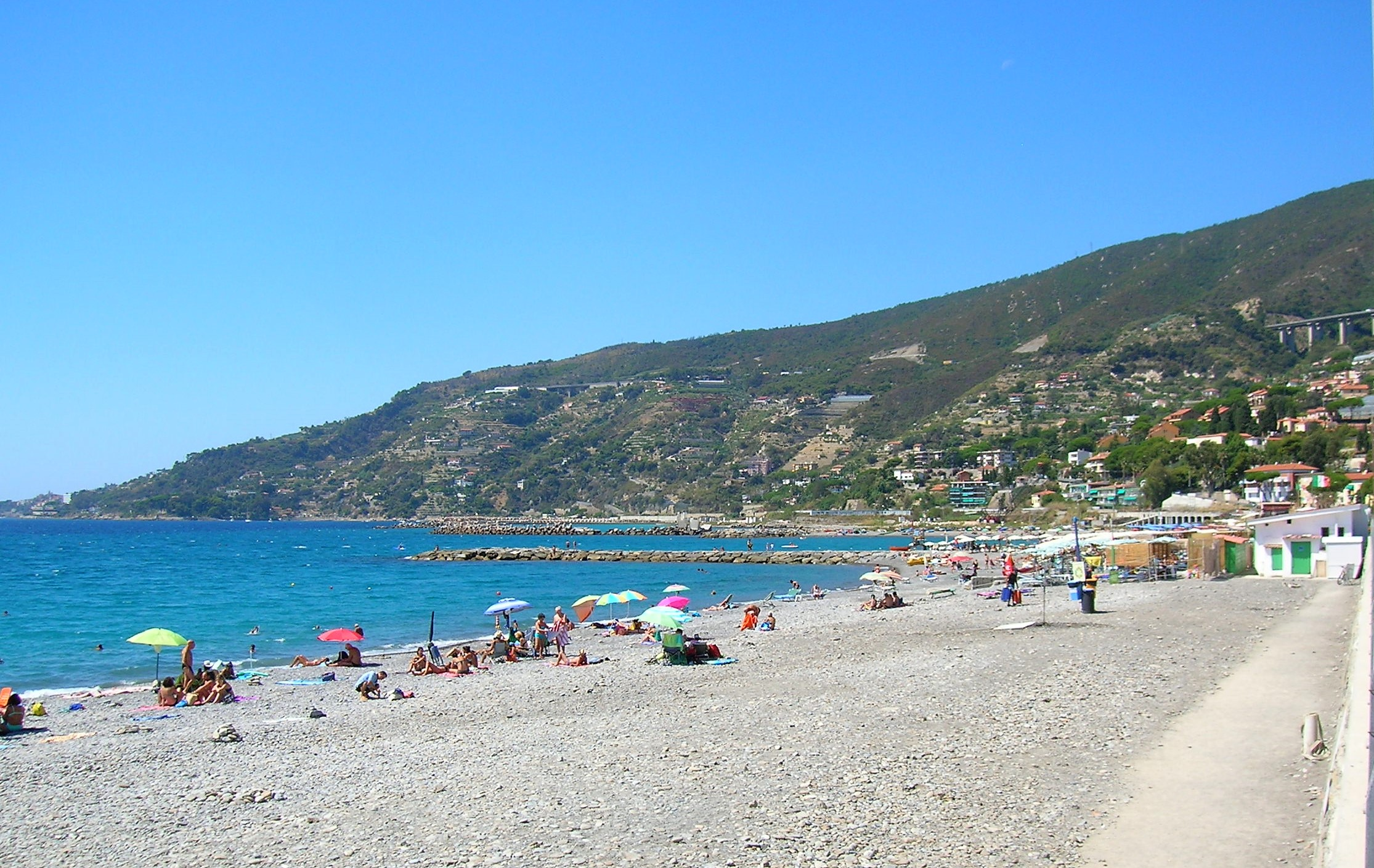 spiaggia di Ospedaletti, Liguria, Italia.